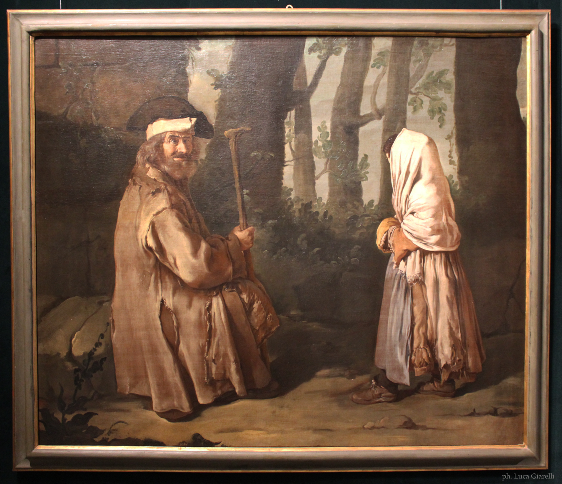 Due poveri in un bosco (L'incontro nel bosco) (Giacomo Ceruti detto Pitocchetto) - Pinacoteca Tosio Martinengo - Brescia